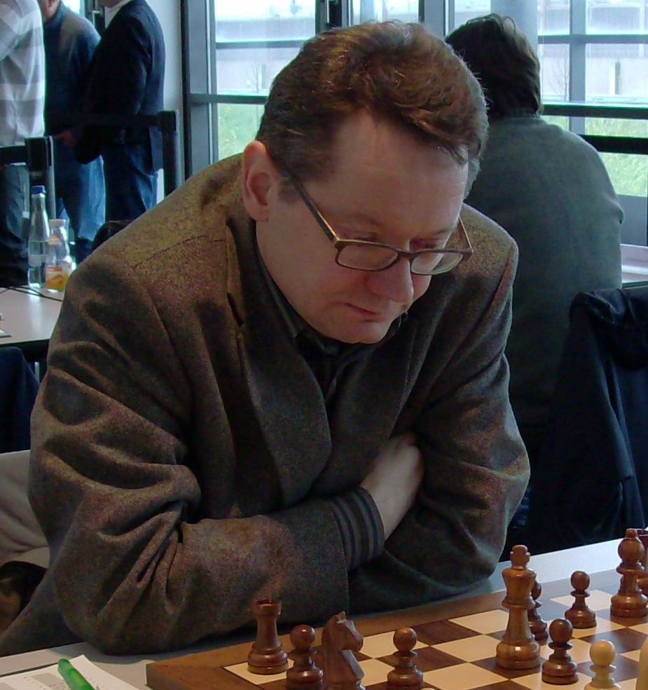 Robert Kuczyński, chess grandmaster from Poland